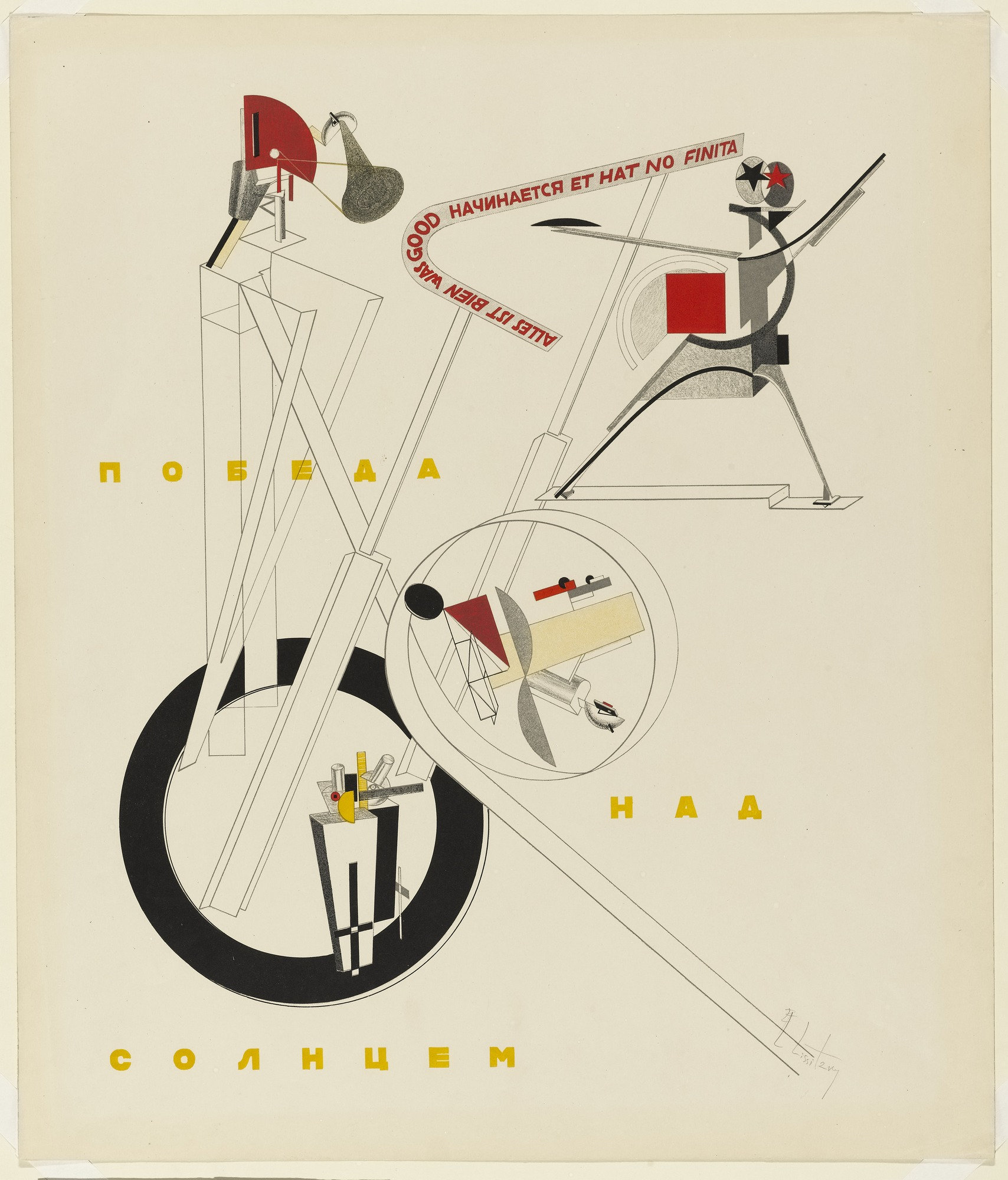 Part of the series Figurinen, die plastische Gestaltung der elektro-mechanischen Schau "Sieg über die Sonne". , p.1